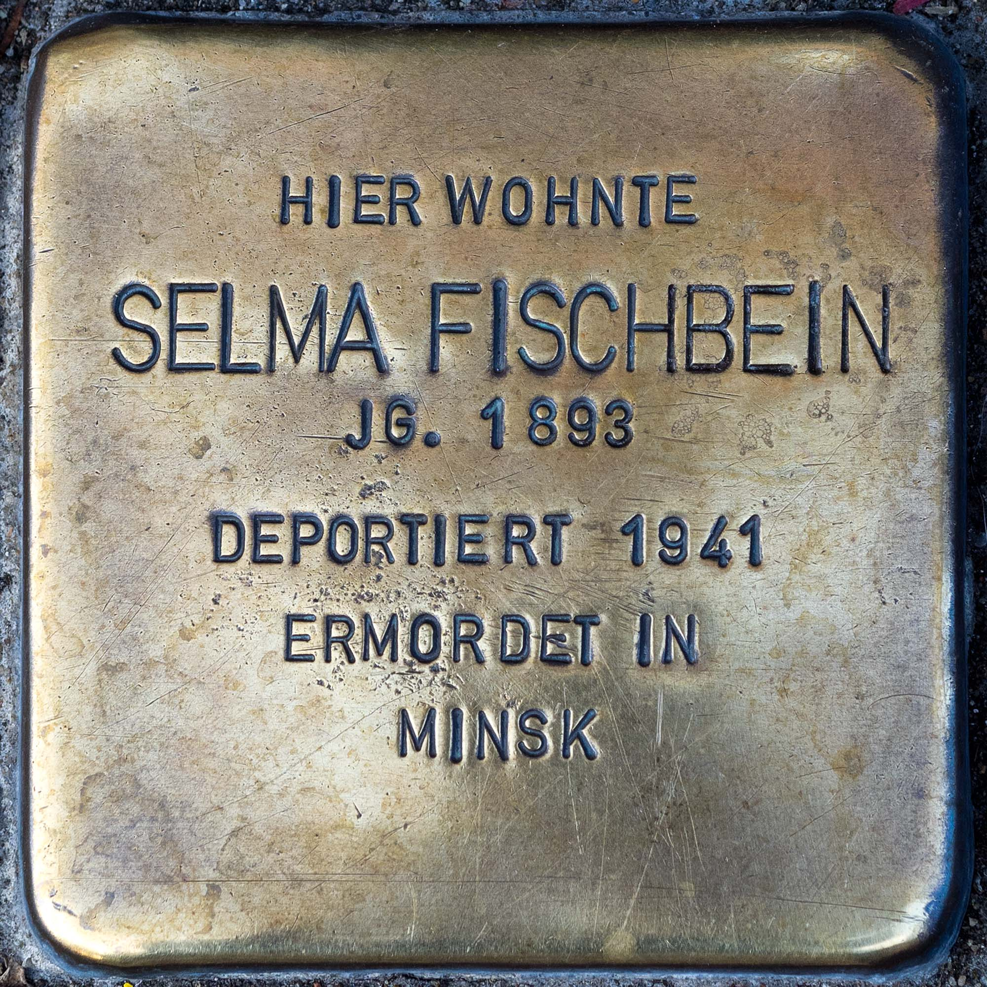 2016 Stolpersteine Toevo Selma Fischbein